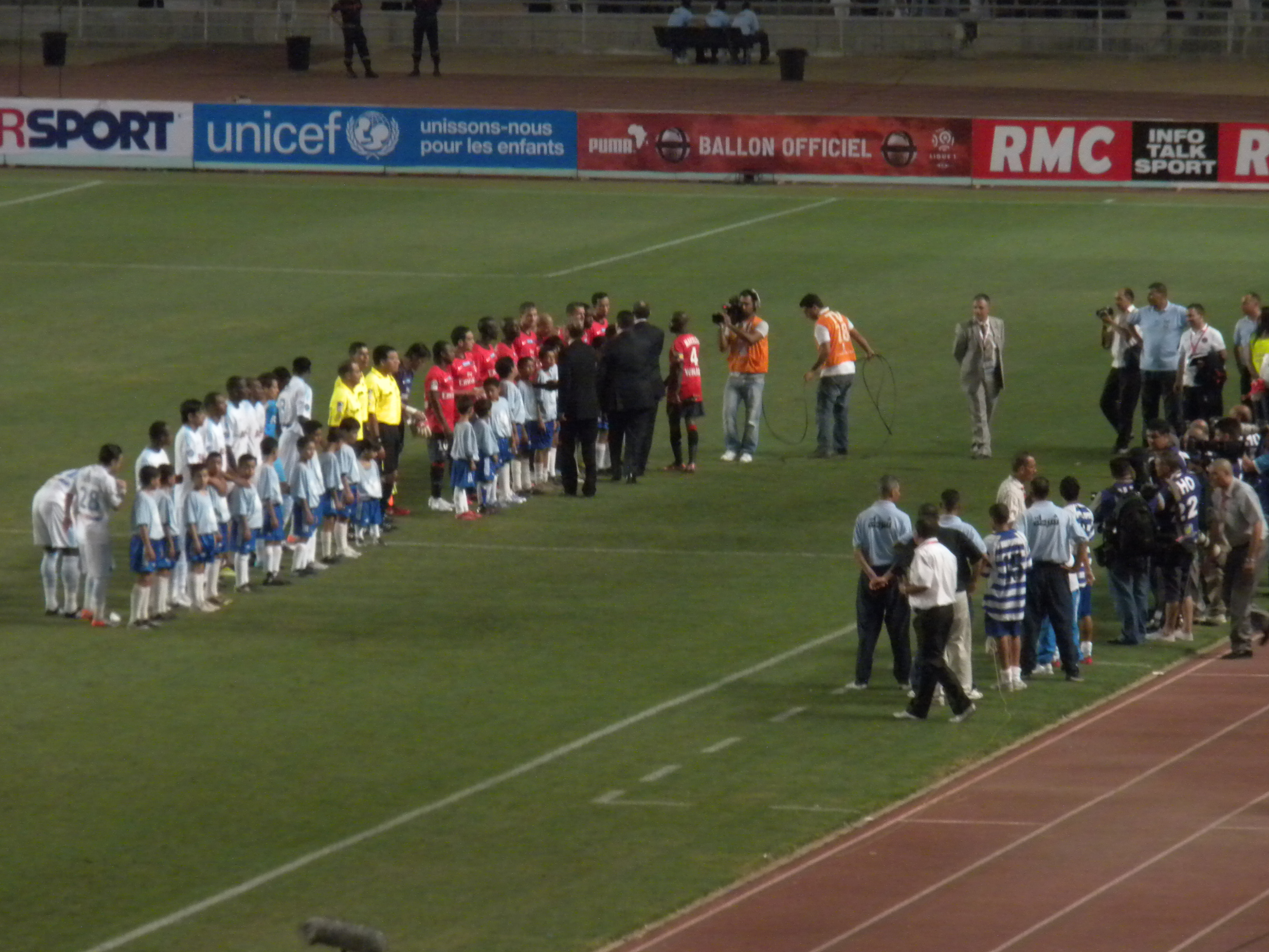 Présentation des joueurs avant le coup d'envoi du Trophée des champions 2010 opposant l'Olympique de Marseille au Paris Saint-Germain au Stade olympique de Radès (Tunisie) le 28 juillet 2010